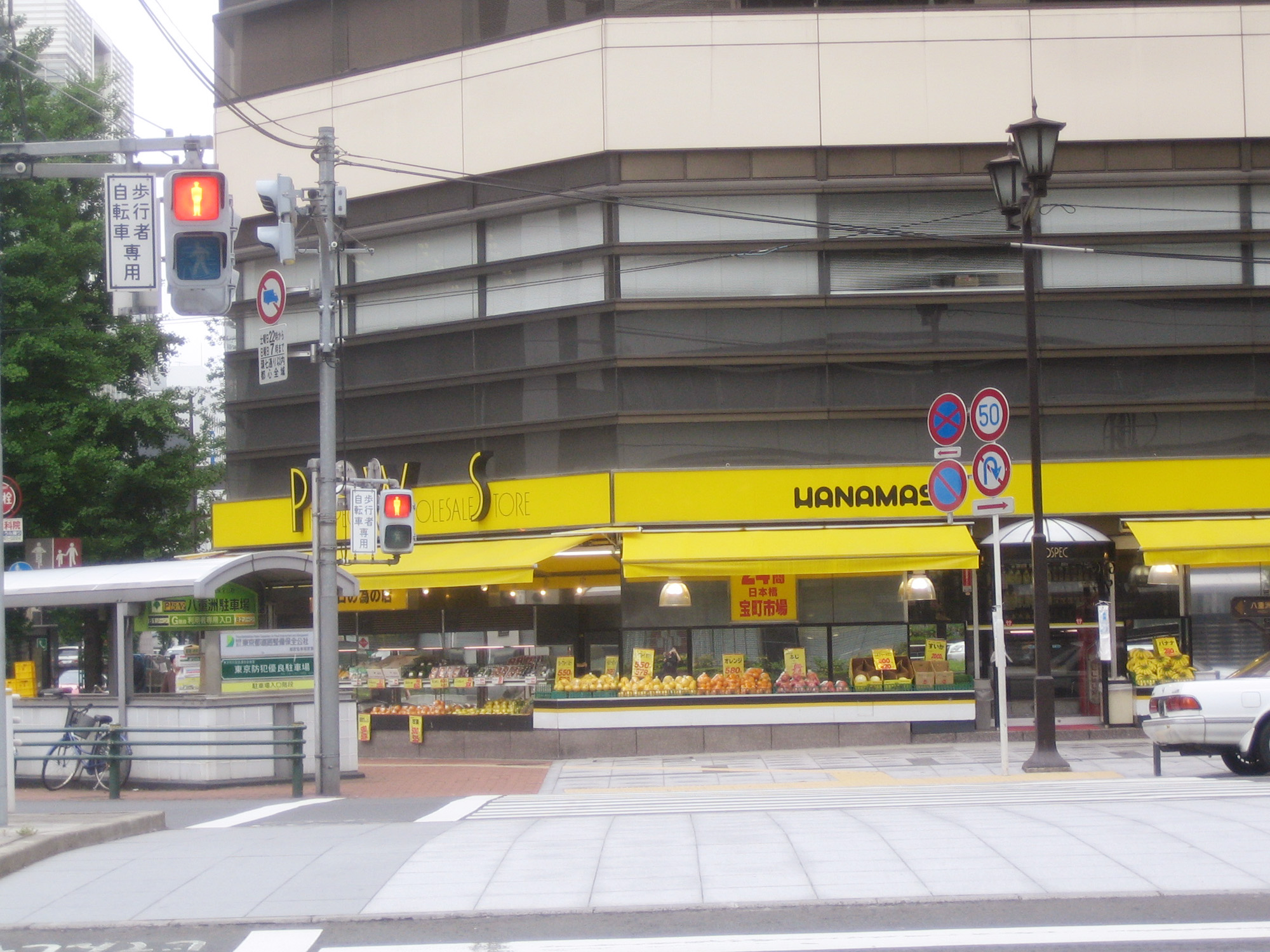 Hanamasa Nihonbashi-Takaracho branch (ハナマサ日本橋宝町支店), in Chuo, Tokyo, Japan